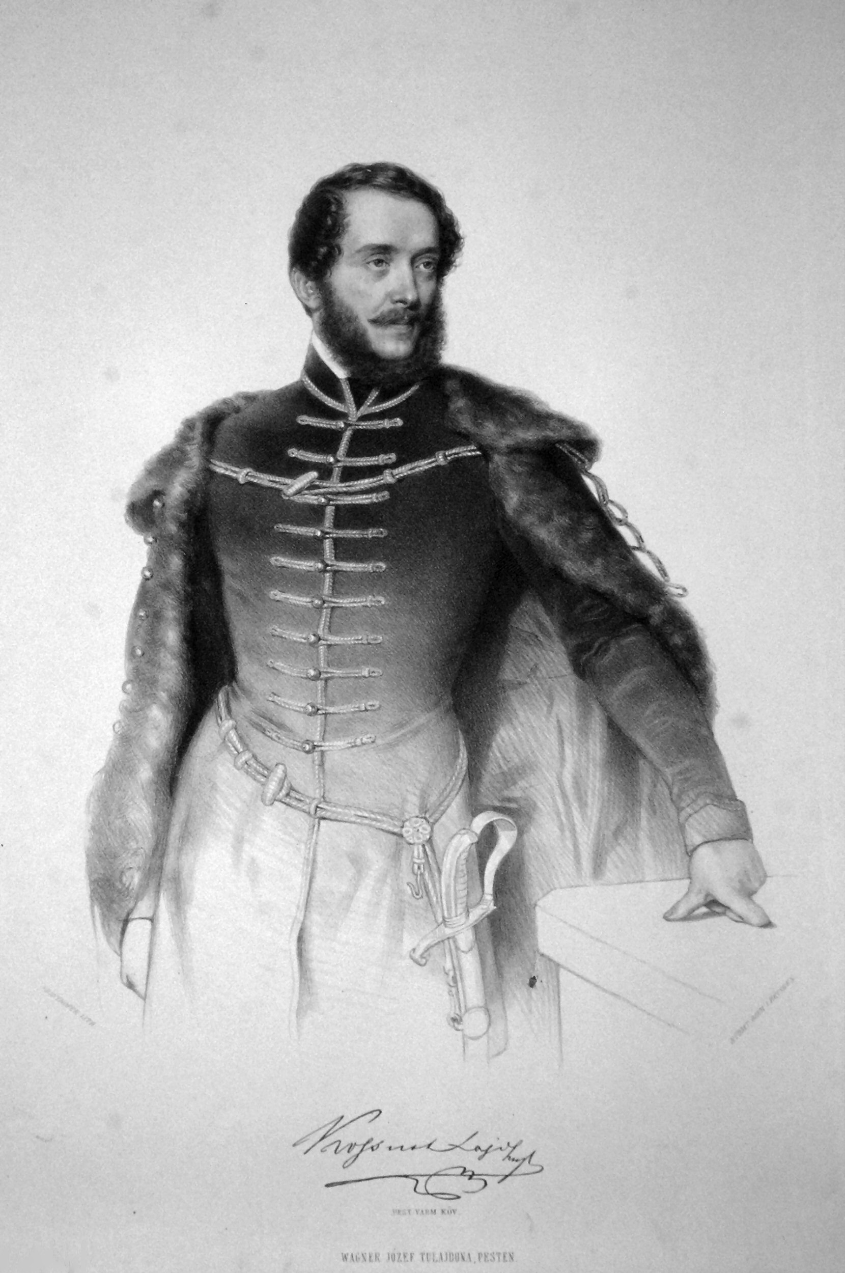 Ludwig Kossuth (1802-^892), Rechtsanwalt, ungarischer Politiker und Revolutiionär. Lithographie von August Prinzhofer, 1848